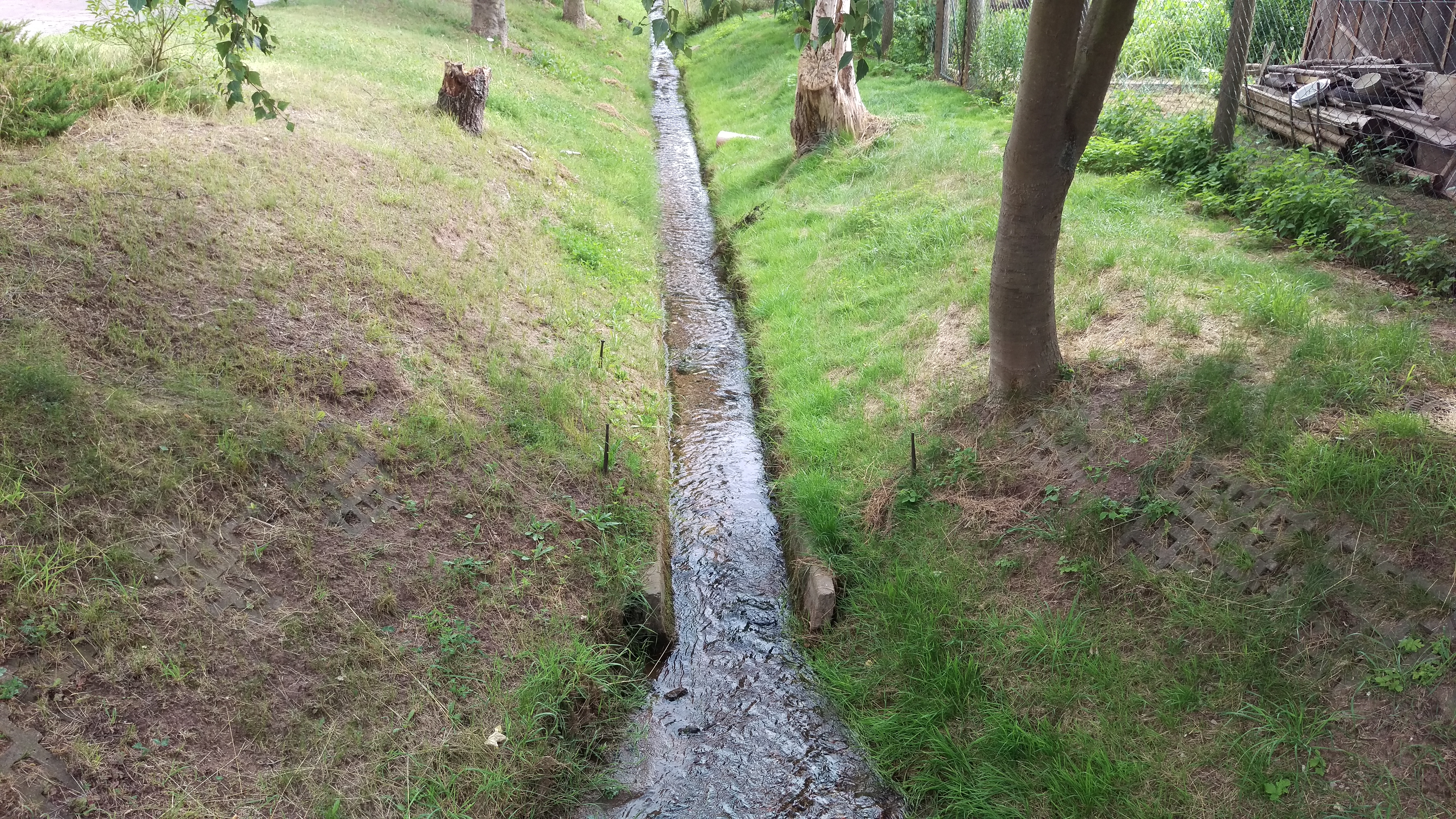 Der Badraer, hier auch Thaleber Bach genannt, an der Gemeindeverwaltung Steinthaleben bei normaler Wasserführung.